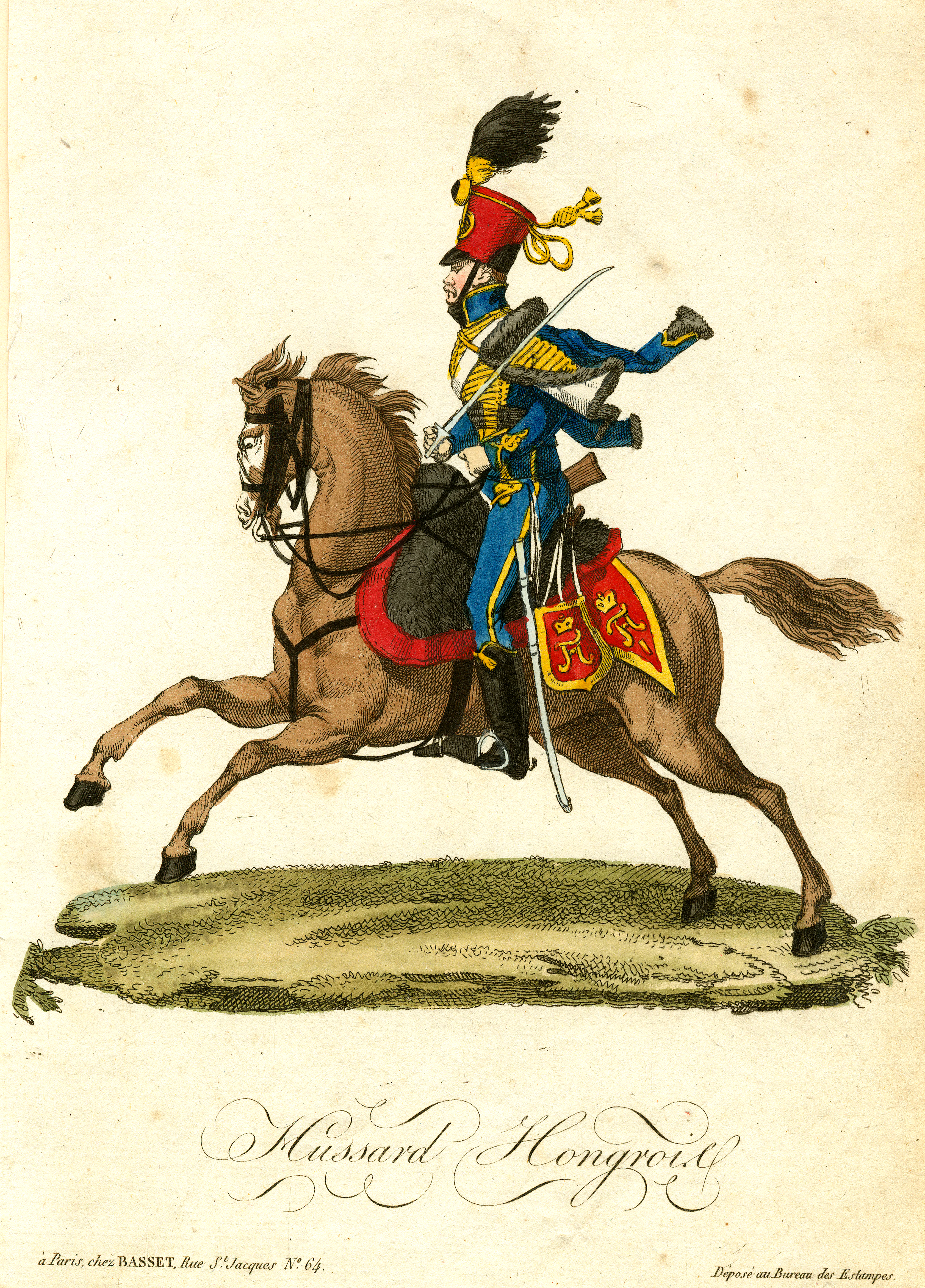 Hussard Hongrois